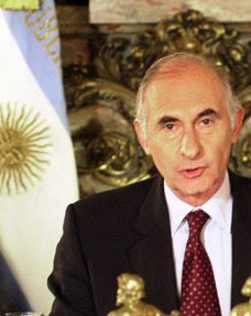 Fernando de la Rúa. Presidente. 2001.